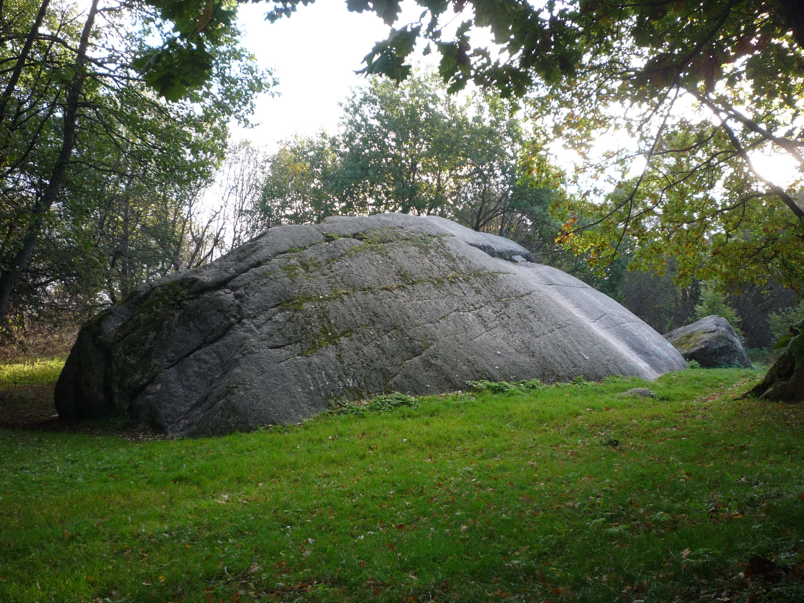 Eesti suuruselt teine hiidrahn, Kabelikivi. Muuga, Viimsi vald, Harju maakond, Eesti.